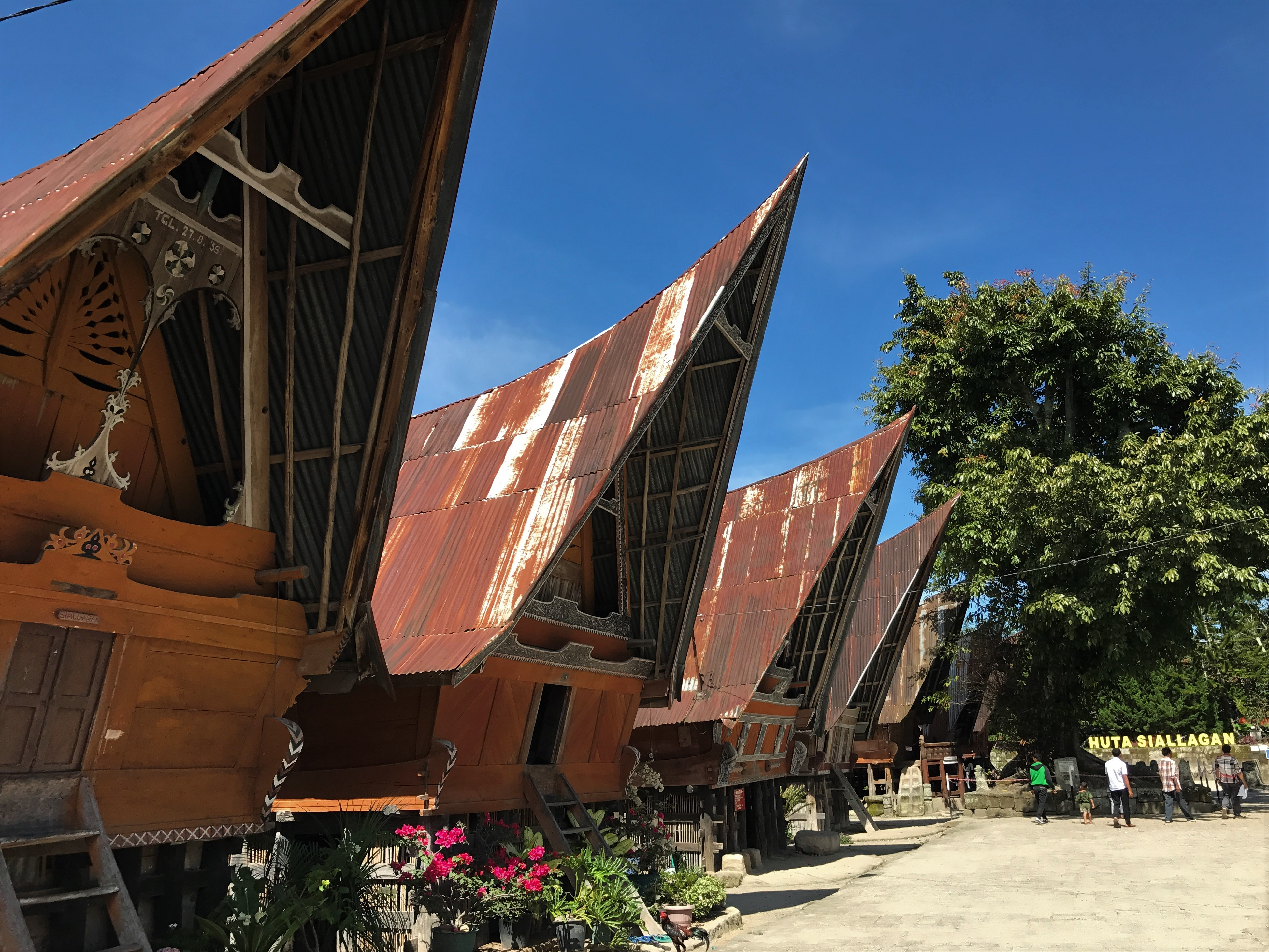 Rumah Bolon merupakan rumah adat tradisional suku Batak Samosir. Jejeran Rumah Bolon ini berada di Huta Siallagan, atau yang dikenal sebagai kampung kanibal di masa lampau.